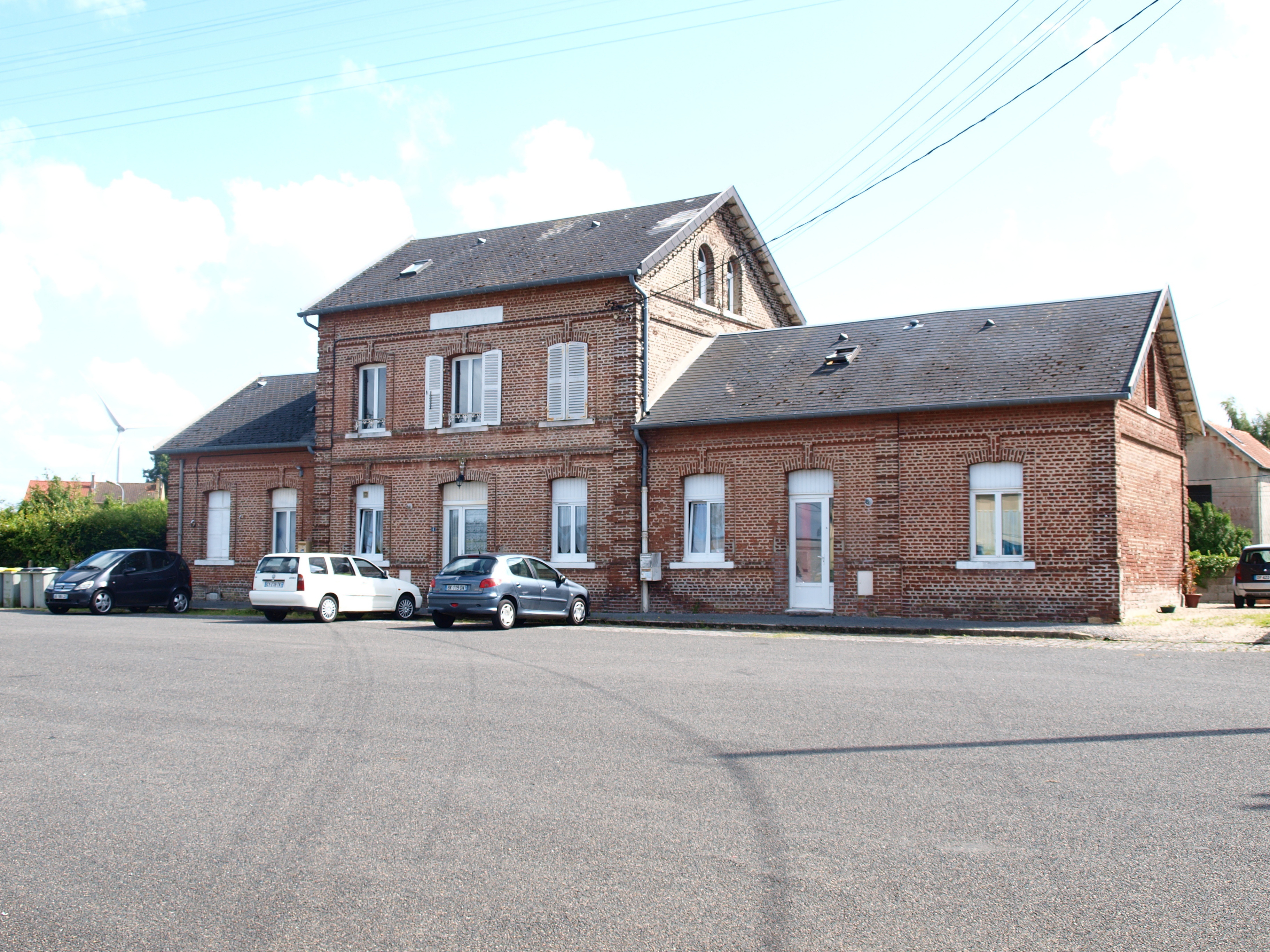 Ancienne gare de Woincourt (Somme, France)